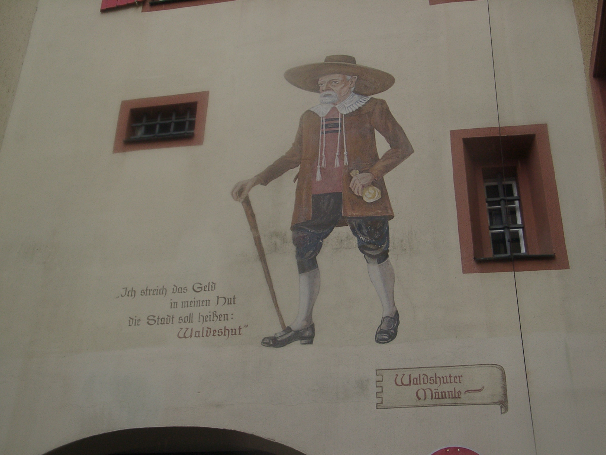 Waldshuter Männle